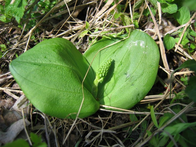 Großes Zweiblatt Listera ovata, Rügen